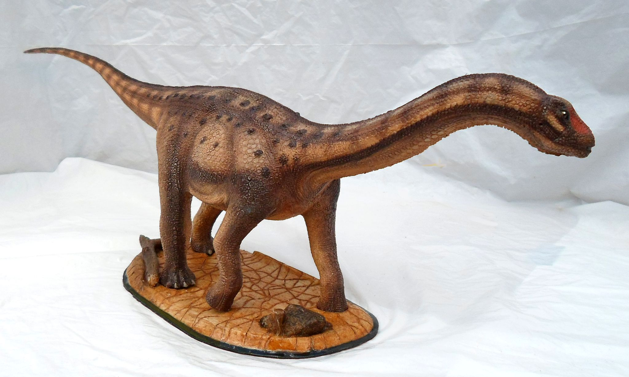 Adamantisaurus mezzalirai, modelo em resina na escala 1/20 (475 mm)